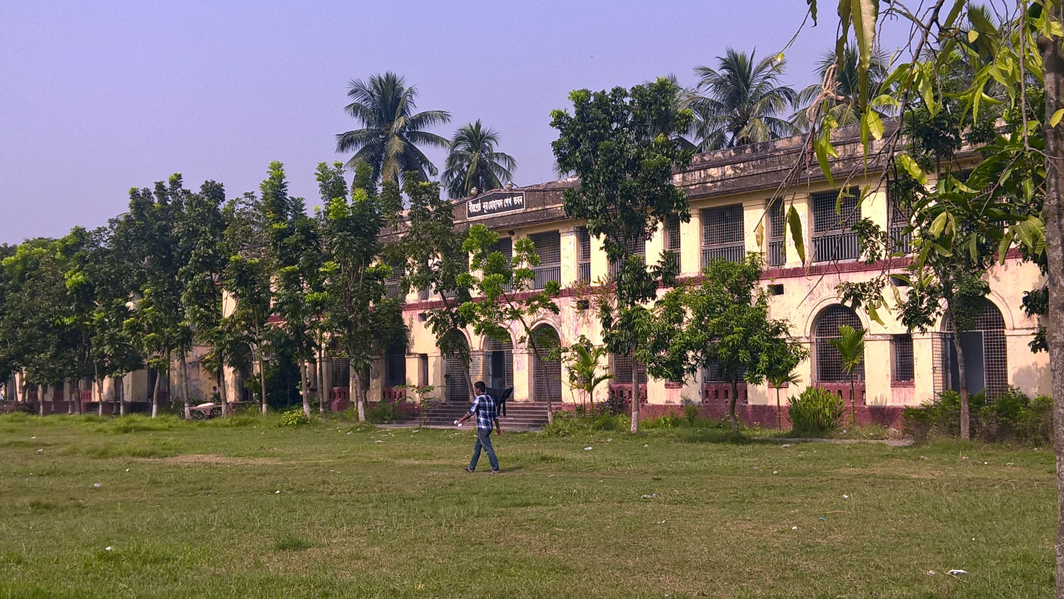 সময়ের প্রয়োজনে ১৯২২ সালে রাজশাহী কলেজ মুসলিম ছাত্রাবাসের যাত্রা শুরু। ছাত্রাবাসটি বর্তমানে কলেজের প্রাণকেন্দ্র হিসেবে চিহ্নিত।